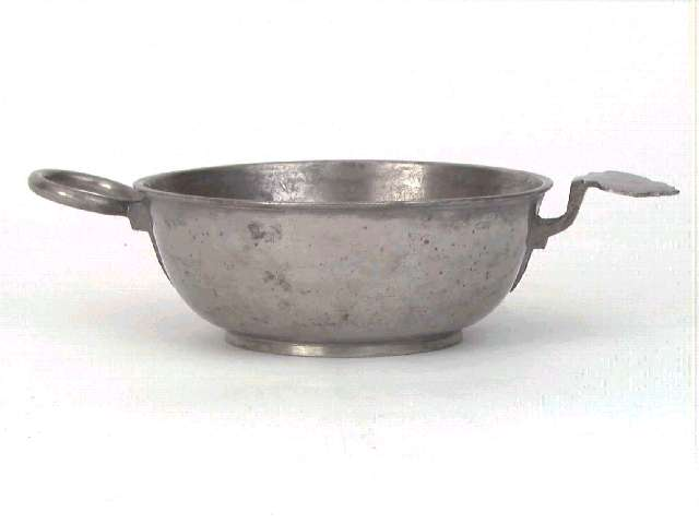 Øreskål av tinn, datert 1762, laget av Peder Mads Vahl, Bergen. Lengde 32,5 cm. Norsk Folkemuseum, NF.1934-0208.